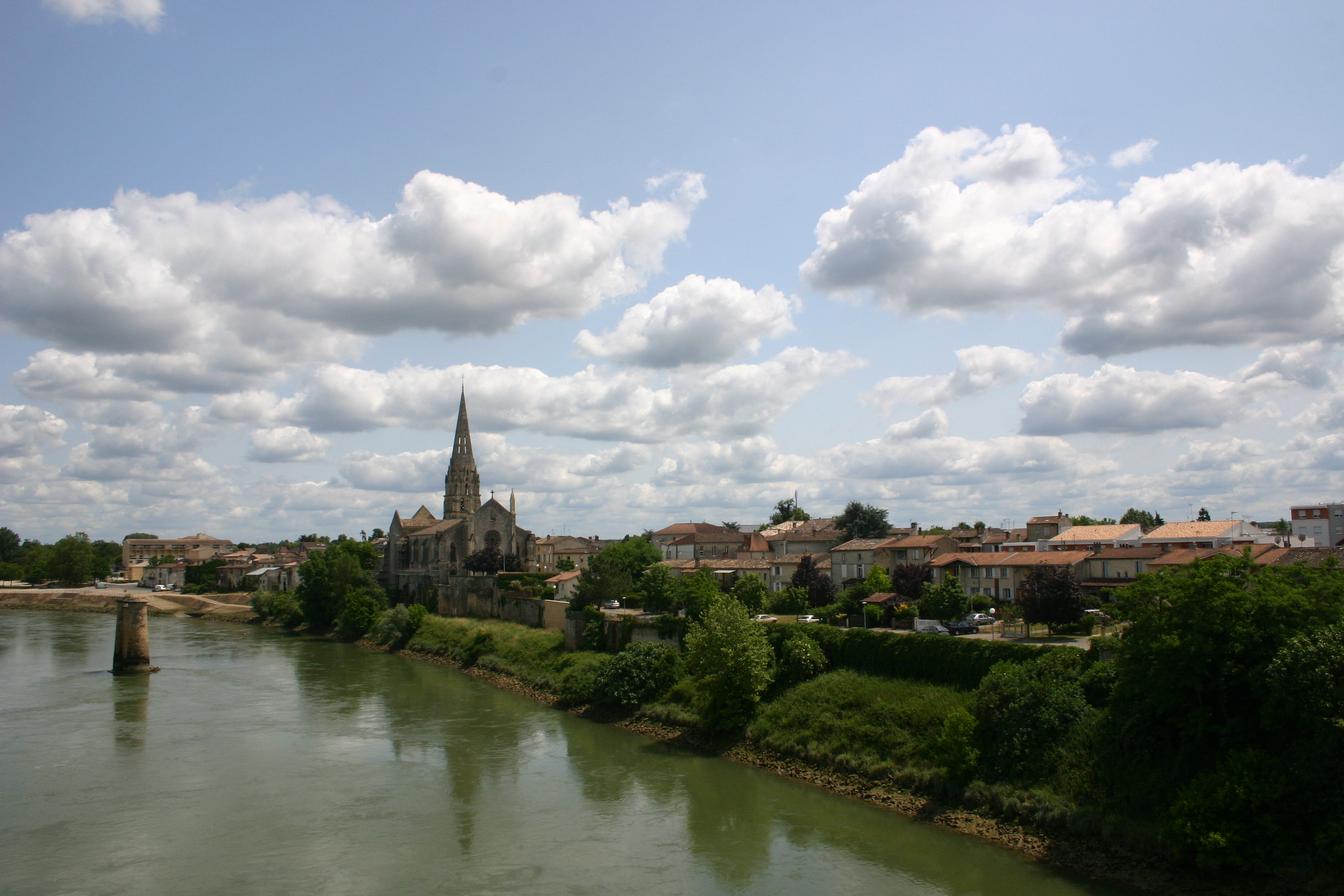 Langon depuis le pont sur la Garonne. Photo Hugues Honoré.